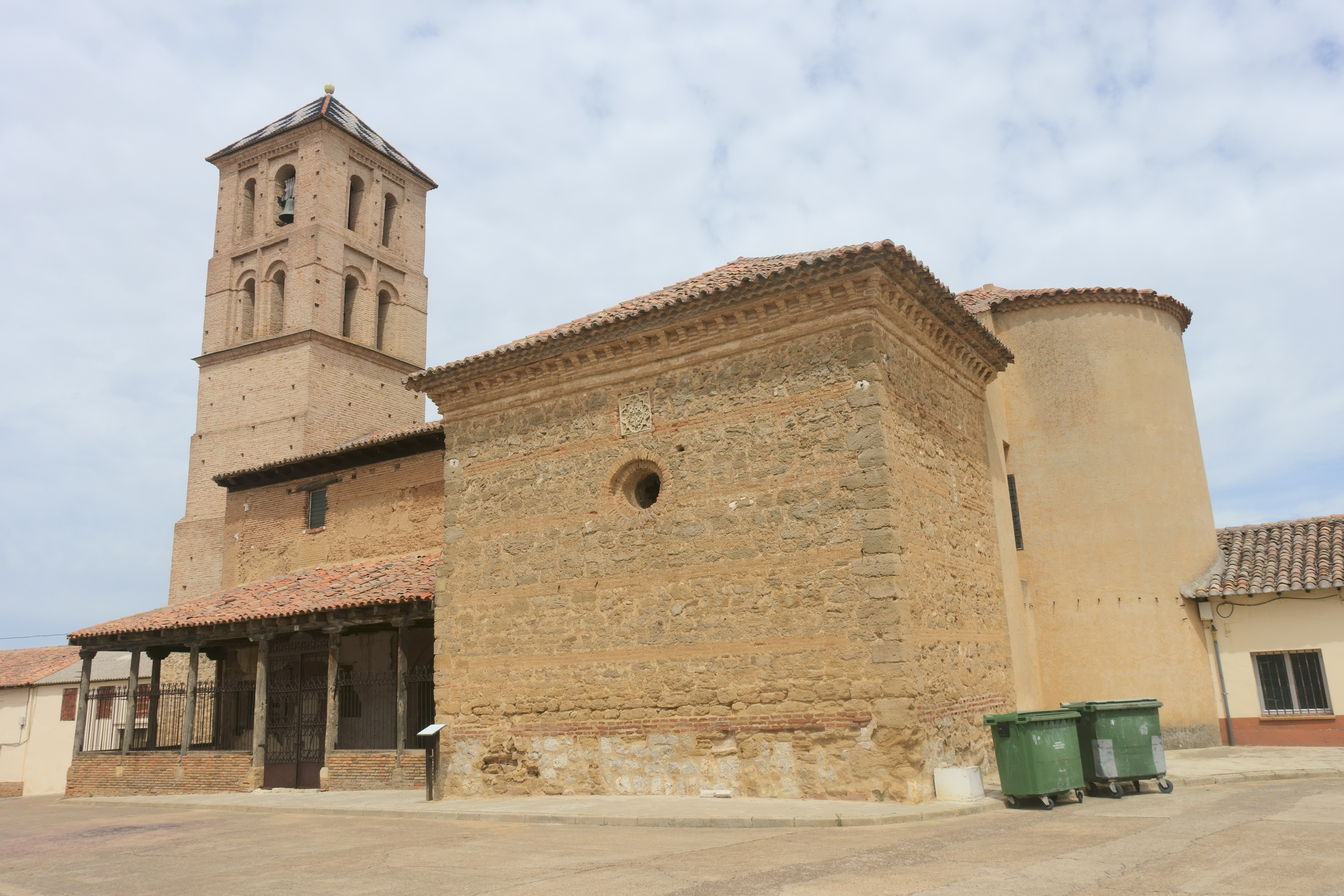 Iglesia de Santa María de Arbas, Mayorga (Valladolid, España).